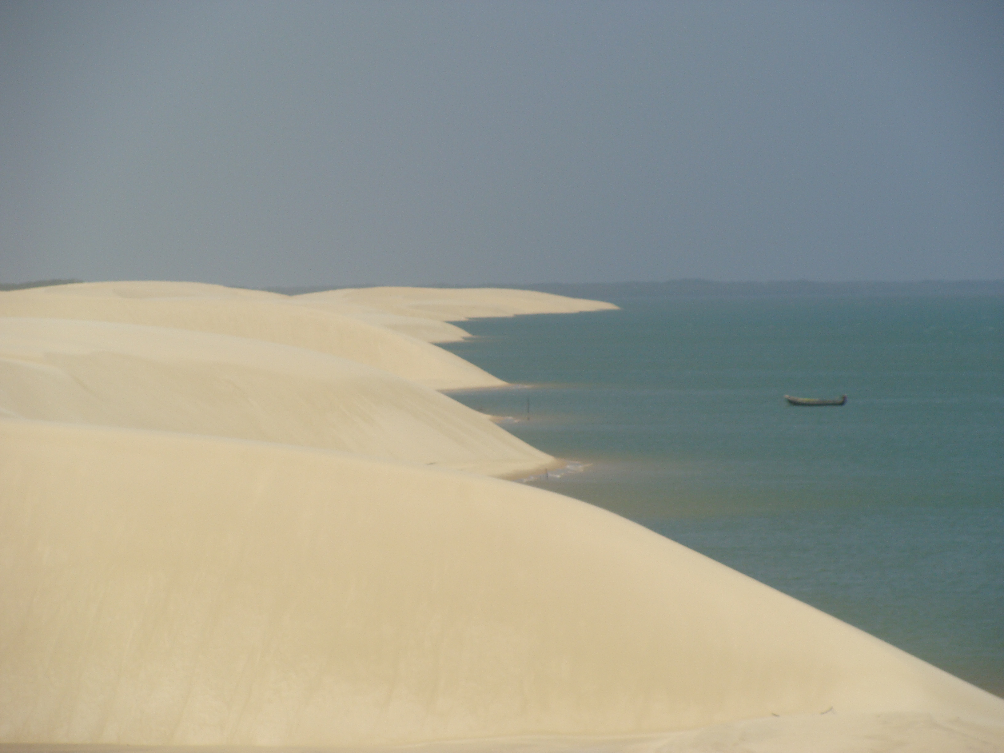 Dunas que formam uma larga restinga na Ilha do Cajú, dando para a Baía da Melancieira - Delta do Parnaíba (lado Maranhão)